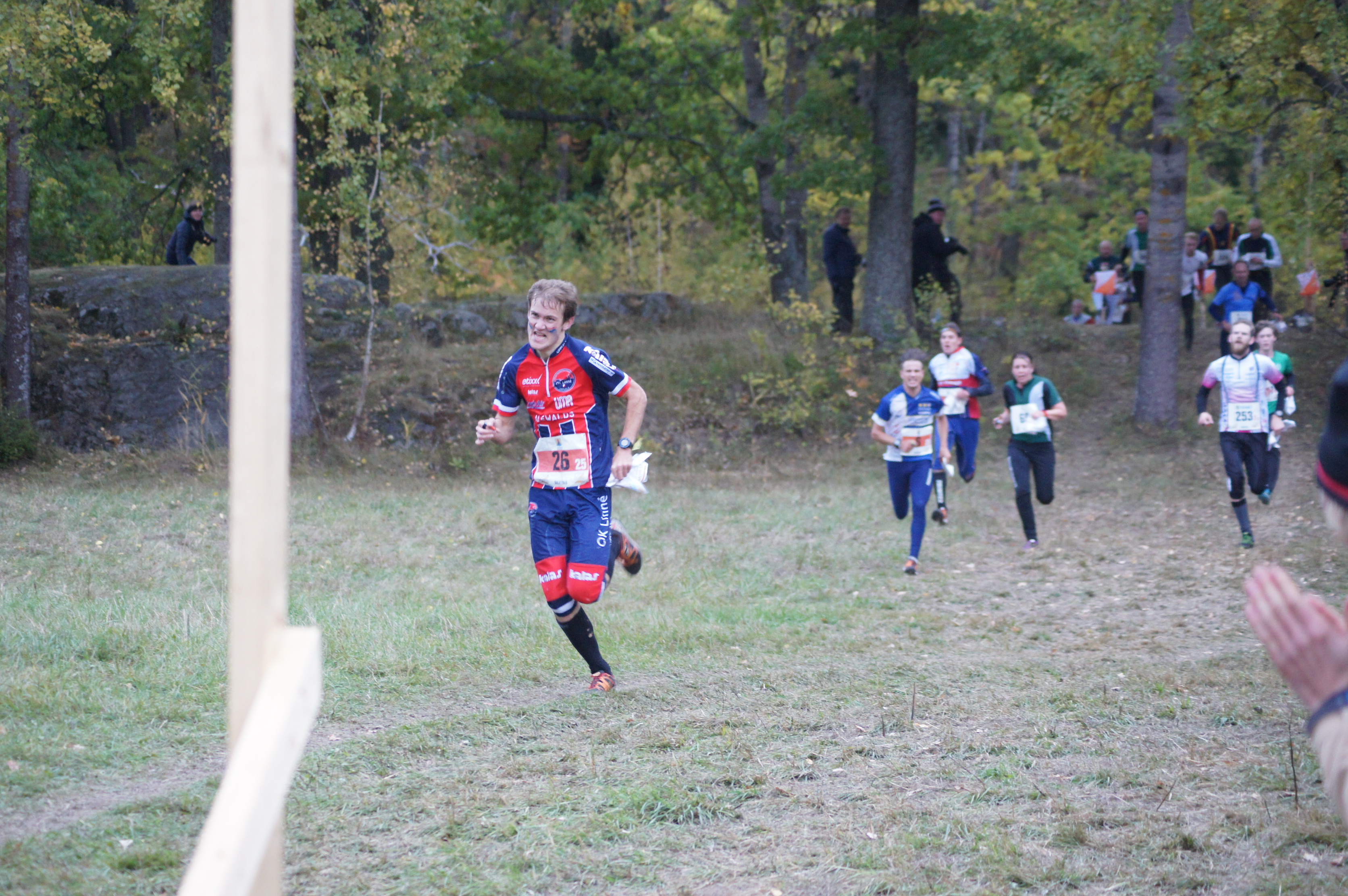 Albin Ridefelt på spurten av 25-manna där han sprang sista sträckan i OK Linné lag 1.